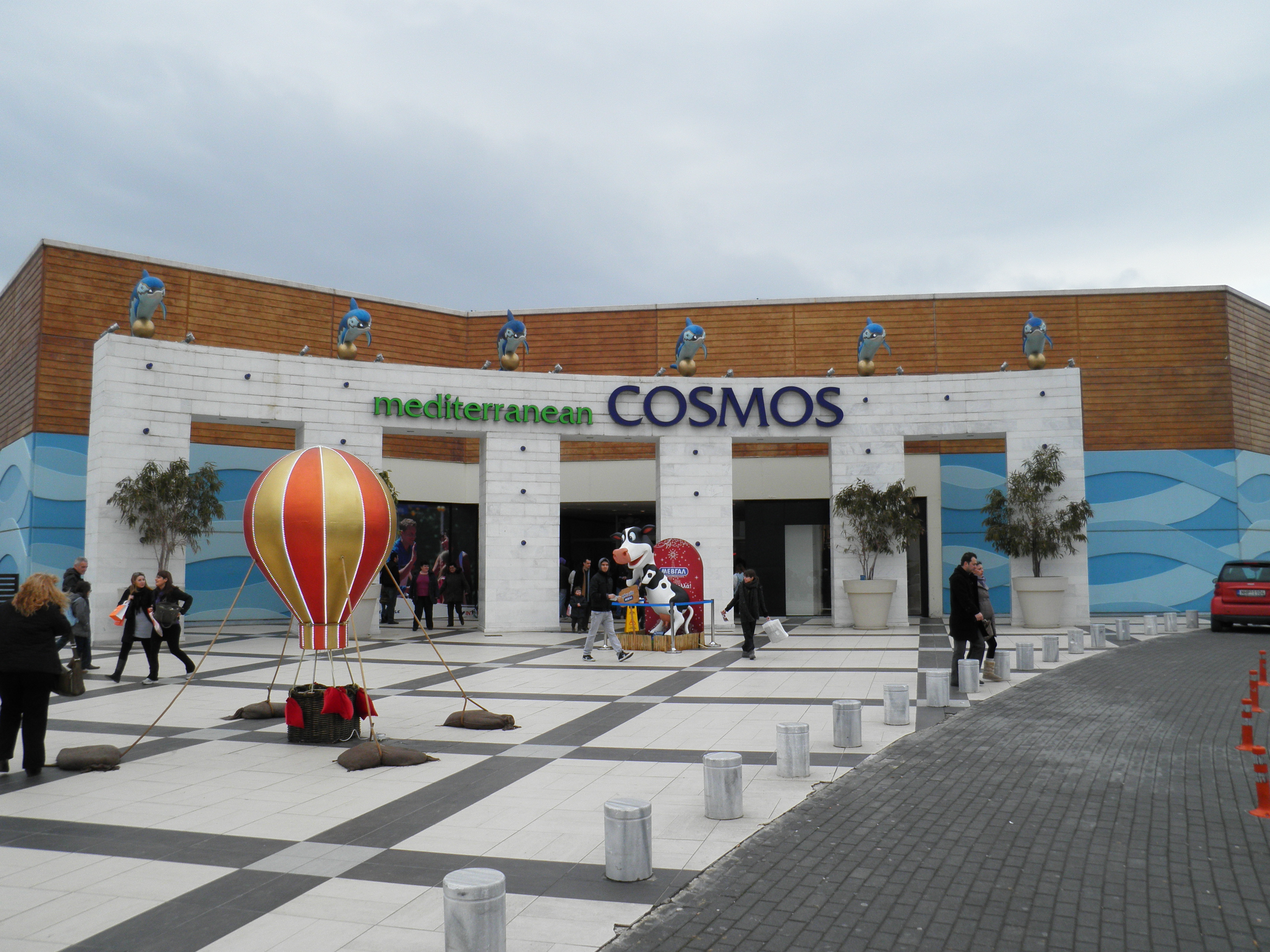 Cosmos